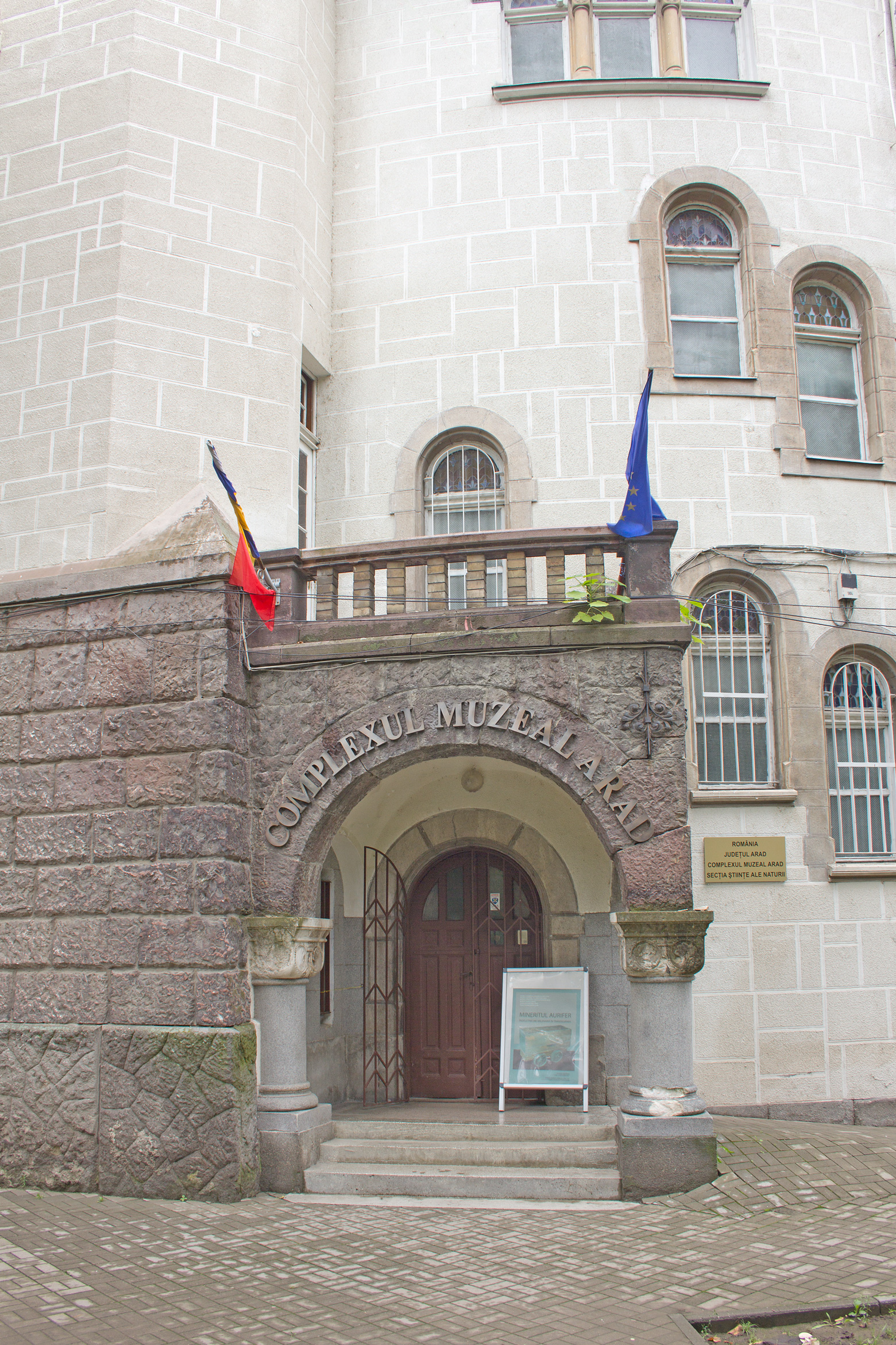 Museumskomplex Arad, Stadt Arad (Rumänien), Eingang zum naturkundlichen Bereich